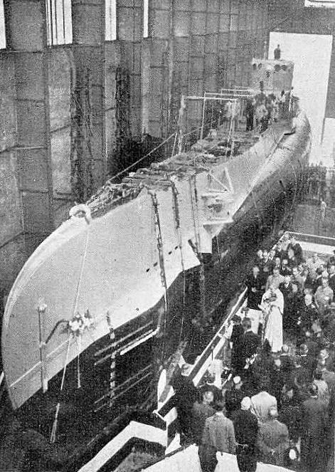 Wodowanie okrętu podwodnego ORP Sęp in Rotterdamie, przy mikrofonie matka chrzestna Maria Babińska 17 października 1938